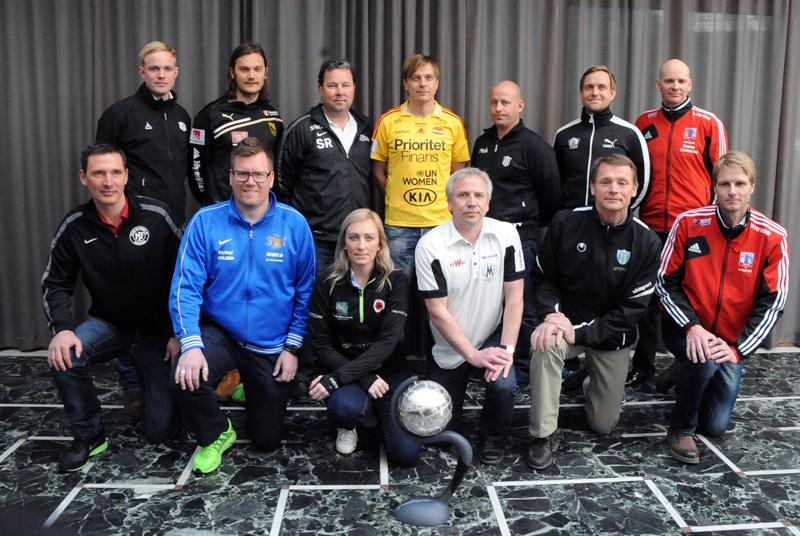 Övre raden från vänster: Jonas Eidvall, LDB FC Malmö, Joakim Blomqvist, Umeå IK FF, Stefan Rehn , Jitex BK, Tony Gustavsson, Tyresö FF, Stellan Carlsson, Piteå IF, Martin Sjögren, Linköpings FC, Thomas Mårtensson, Vittsjö GIK. Nedre raden från vänster: Rickard Nilsson, KIF Örebro DFF, Stefan Ekström, Sunnanå SK, Elisabet Gunnarsdottir, Kristianstads DFF, Stefan Johansson, Mallbackens IF, Torbjörn Nilsson, Kopparbergs/Göteborg FC, Simon Sjöfors, Vittsjö GIK.